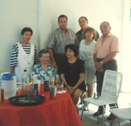 Familia Suarez Fuentes